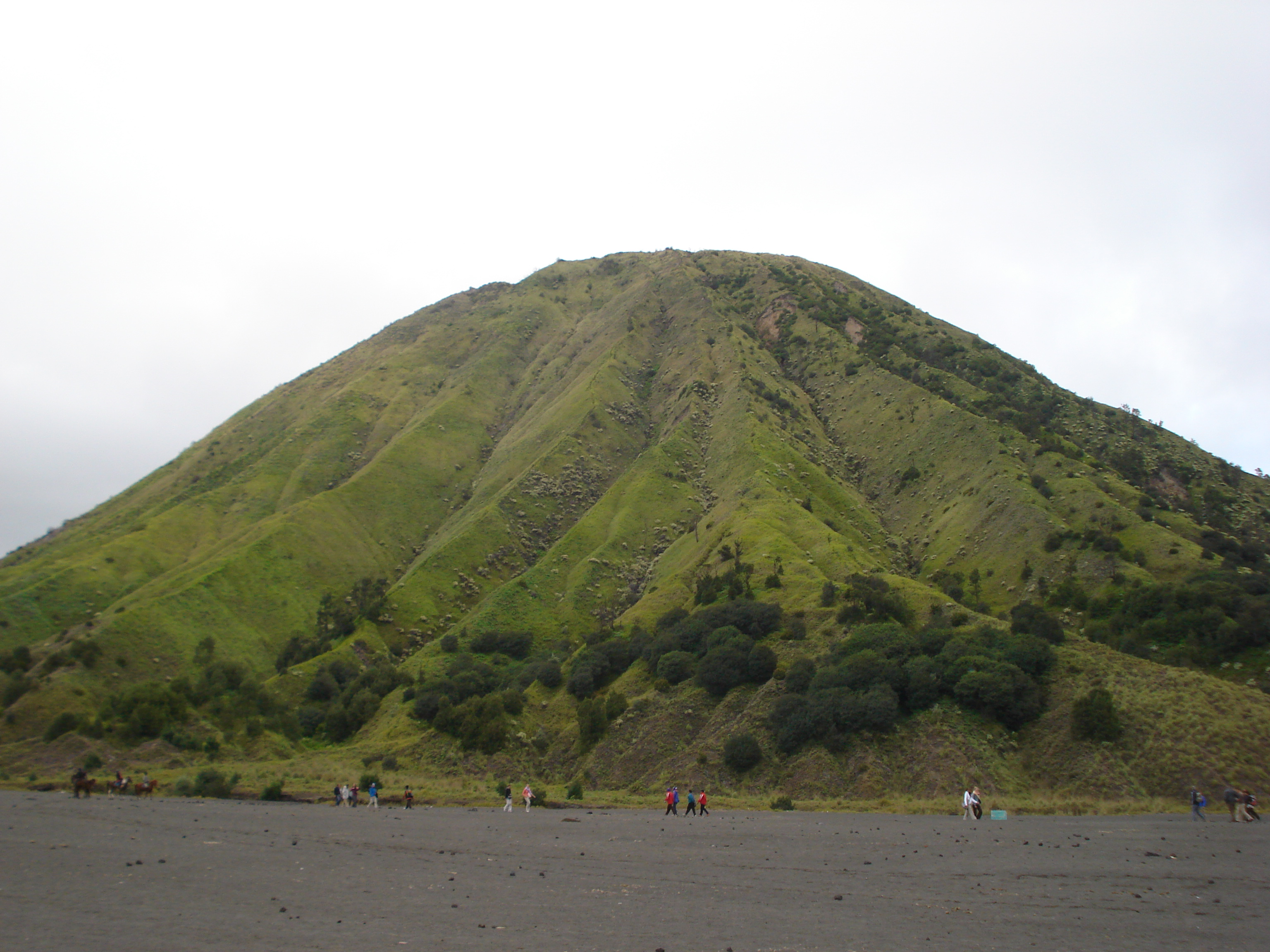 kawasan daerah pegunungan tengger